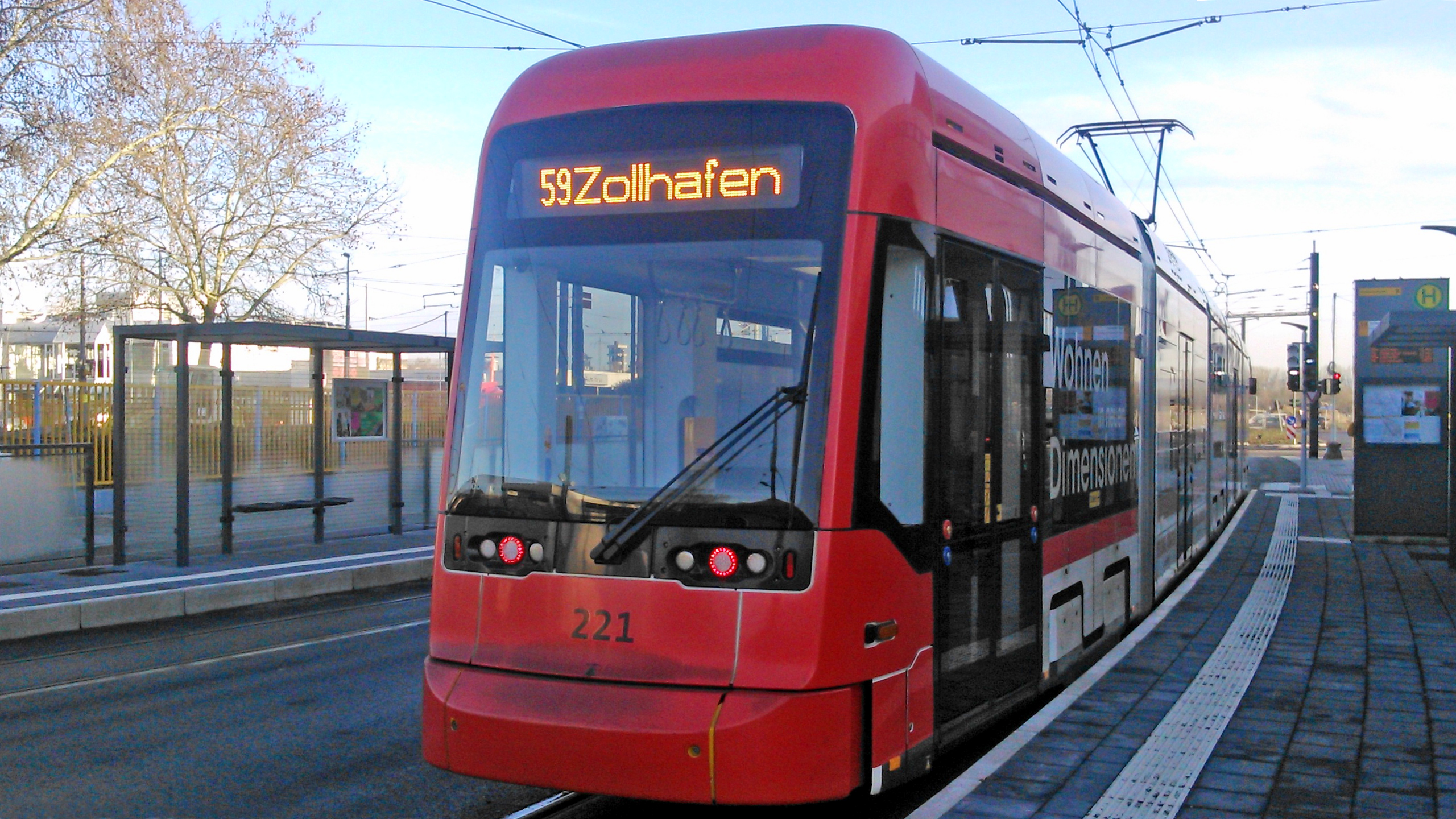 Eine Straßenbahn der MVG-Linie 59 befährt die 2017 fertiggestellte Strecke in Richtung Mainzer Zollhafen